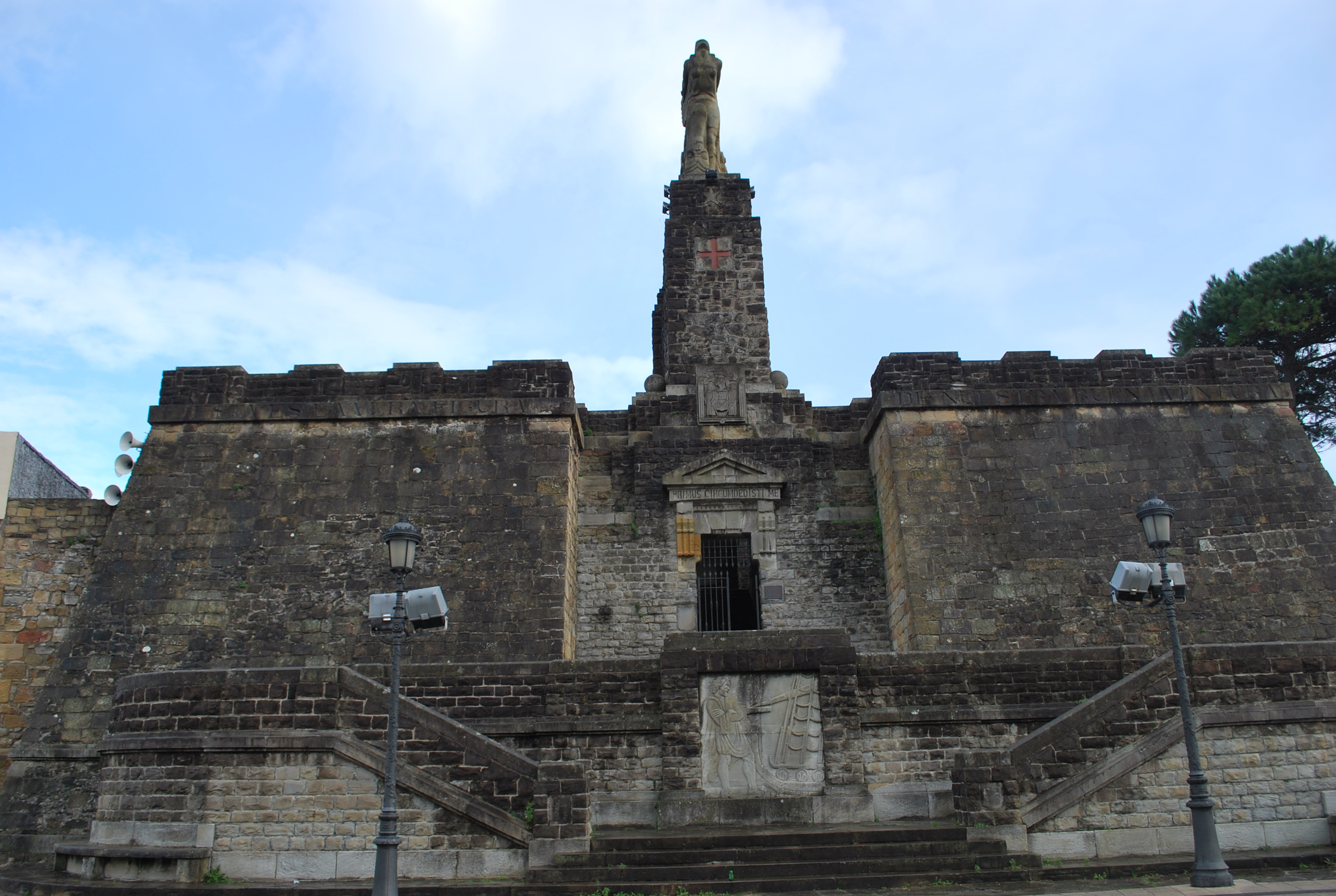 Monument dédié à Juan Sebastián Elcano à Getaria (Guipuscoa).